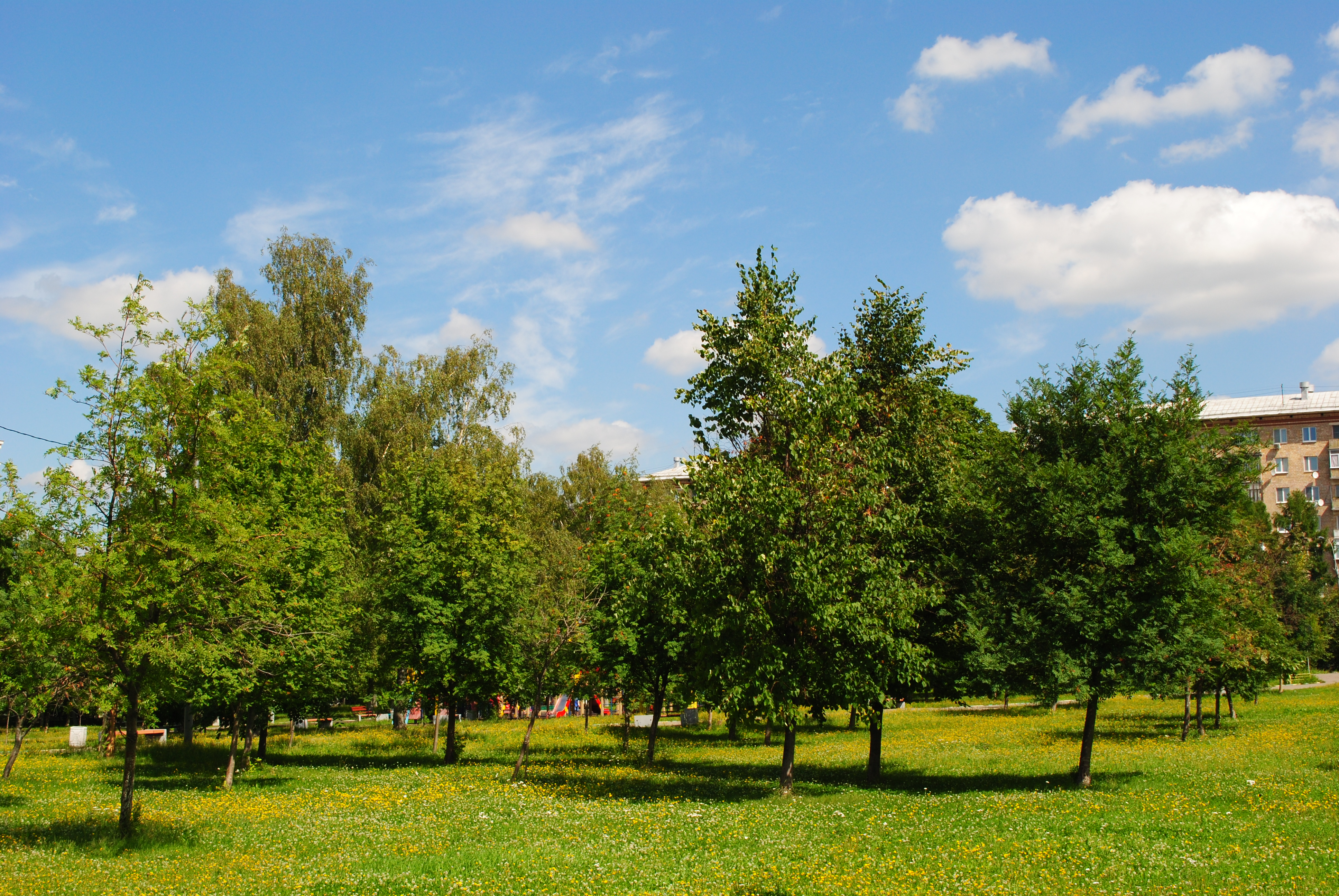 Народный парк Ломоносовского района (Москва), территория между Ленинским проспектом и улицей Крупской